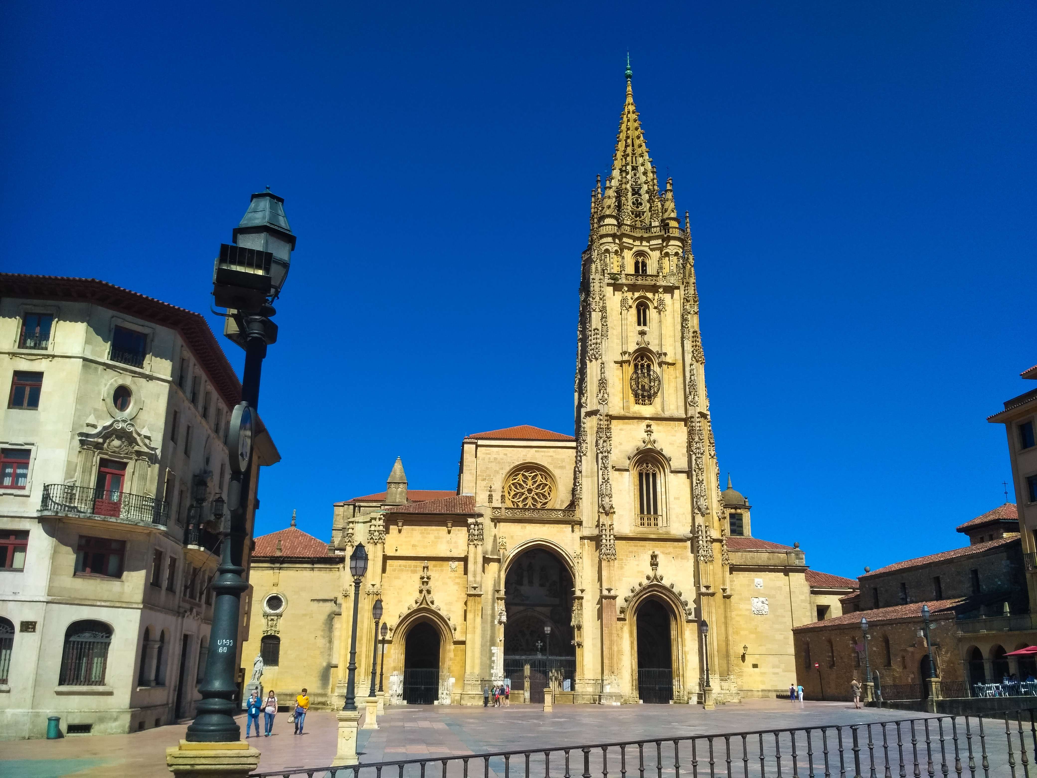 Catedral de San Salvador